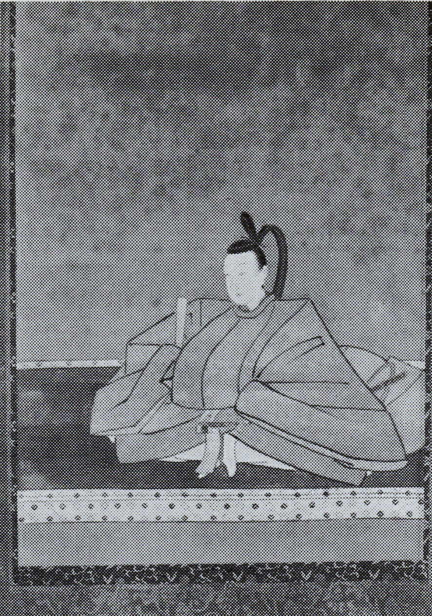 相良頼完の肖像(モノクロ)。